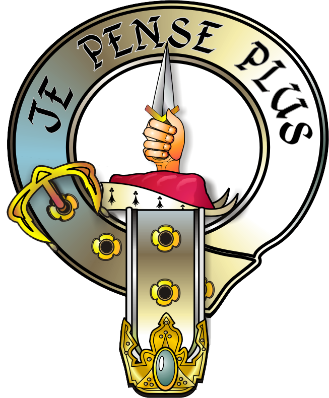 Erskine Crest